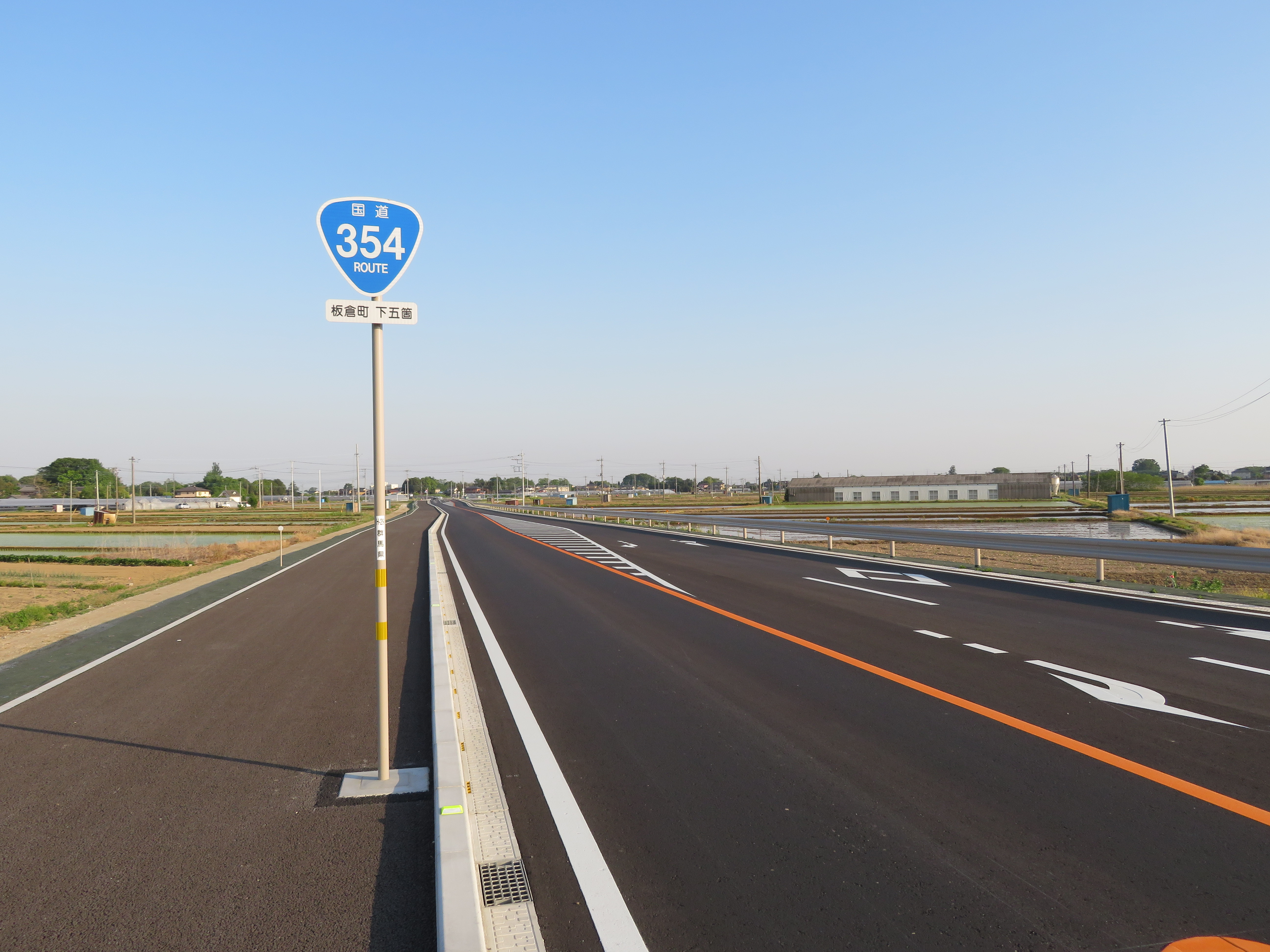 国道354号線板倉北川辺バイパス群馬県板倉町五箇付近（古河方面を撮影） Canon PowerShot SX720 HS